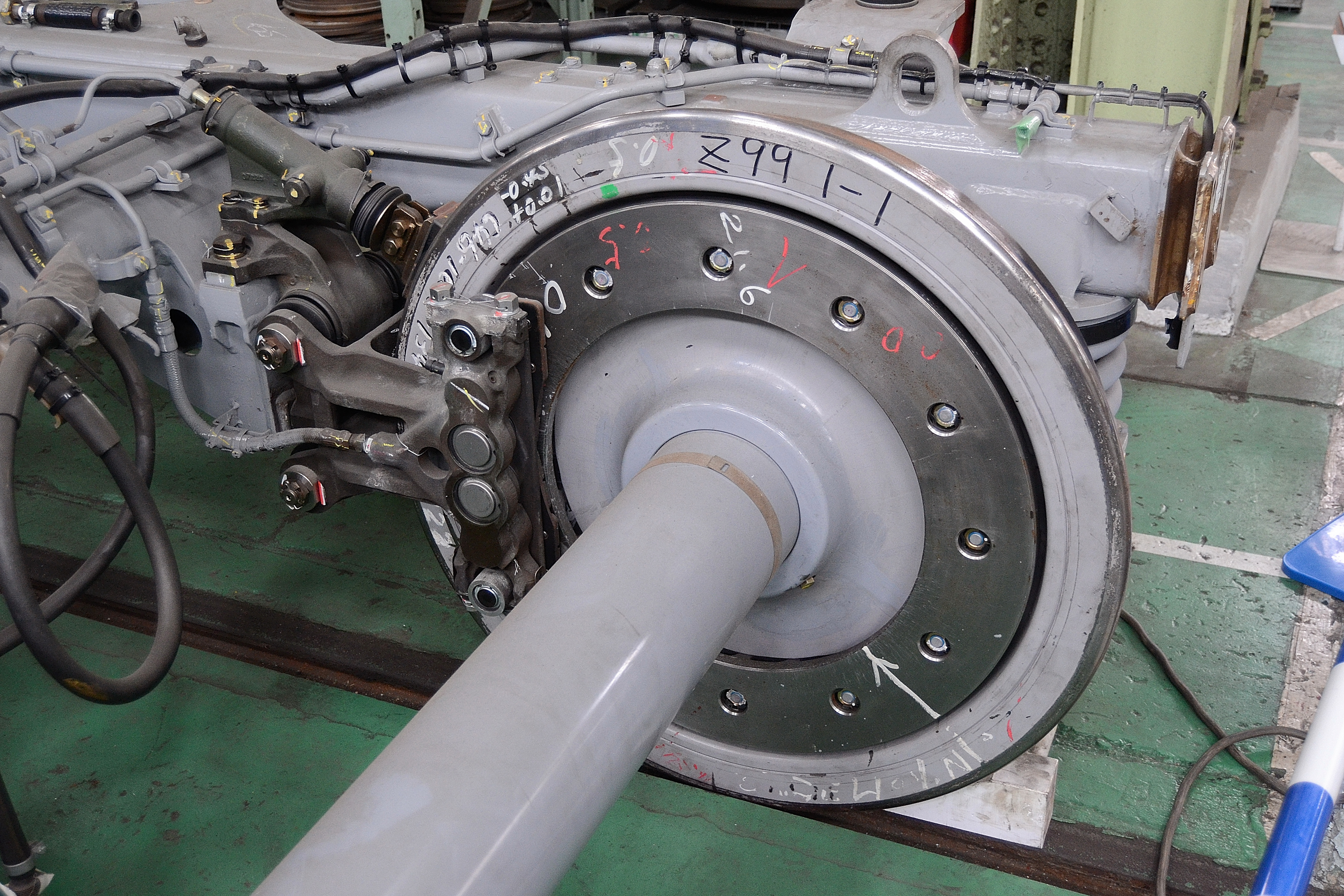 N700系のキャリパー式車輪ディスクブレーキ、2枚のディスクローターが車輪を挟み込む形で取付けられているが、それを車輪に固定する締結ボルトとナットがディスクローターの中央で締結されており、中央締結式と呼ばれている（2014年、浜松工場で開催された新幹線なるほど発見デーにおいて撮影）。